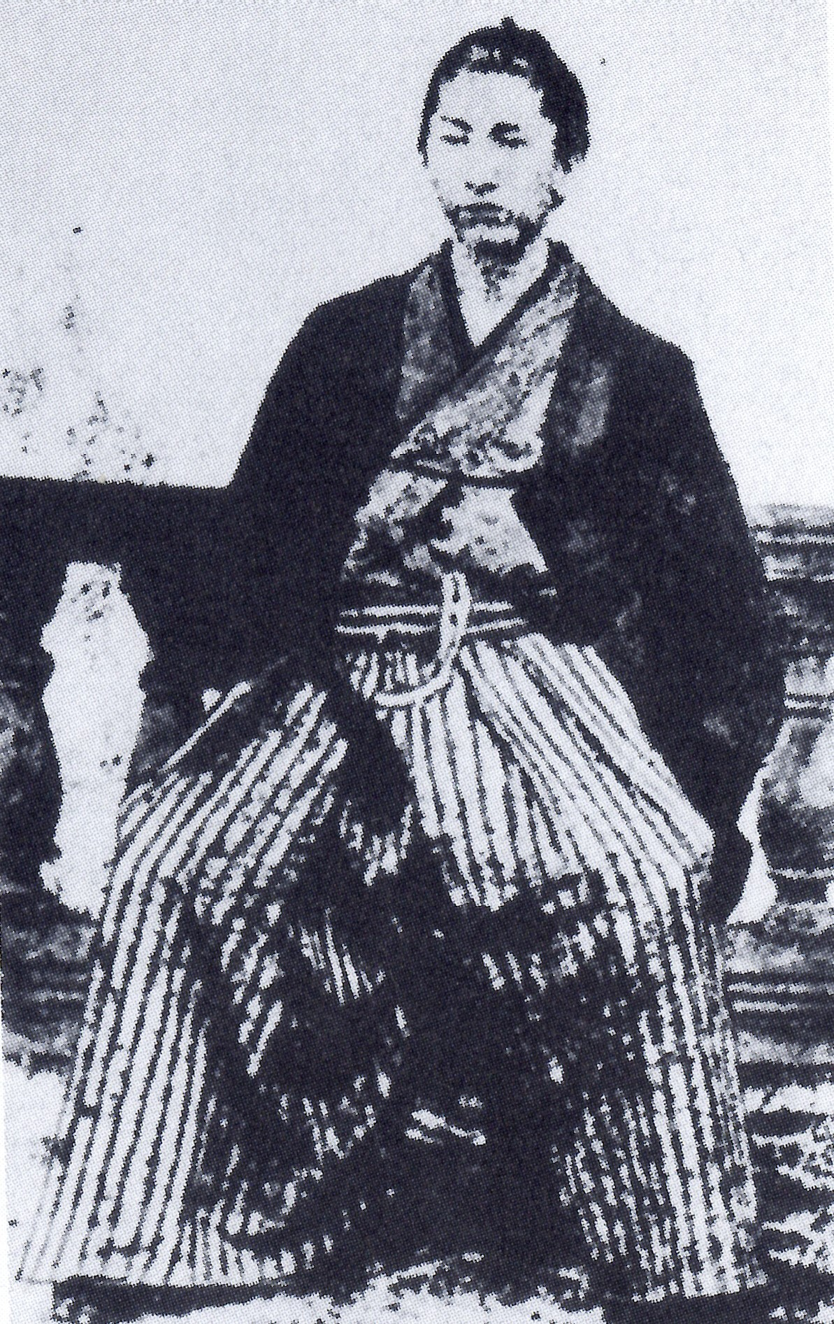 大河内正質の肖像。